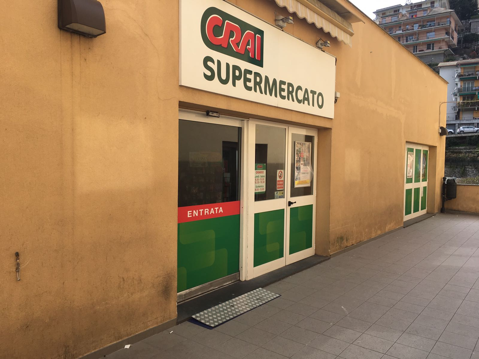 Questa foto mostra l'ingresso di un tipico negozio di prossimità a Sori (GE)